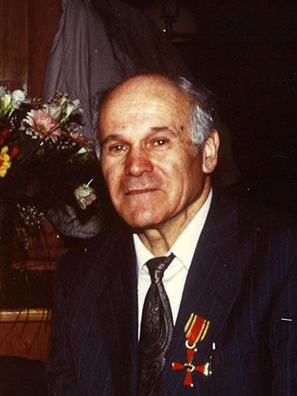 Adolf Burkhardt, esperantisto, luterana pastoro, ekumenisto, en la tago, kiam li ricevis la Federacian Meritkrucon